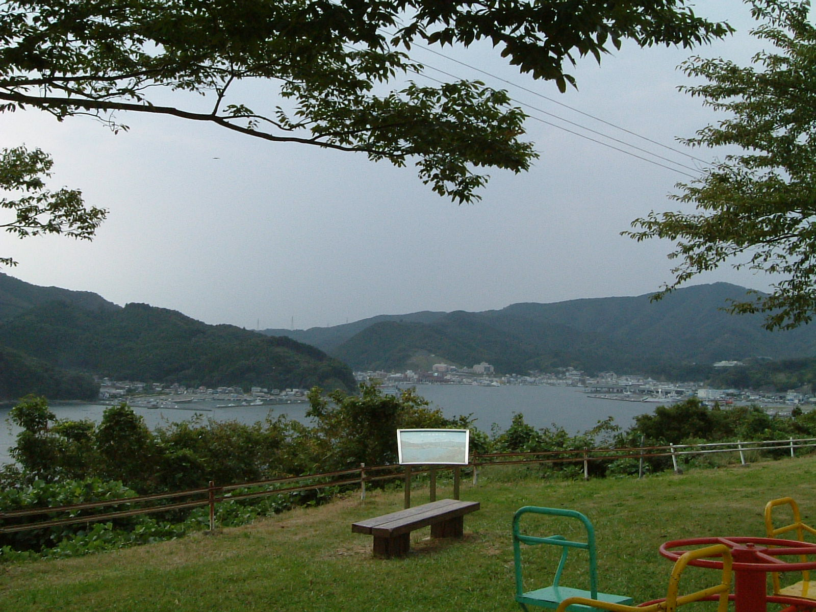 崎山展望台より望む女川湾（2004年9月20日）